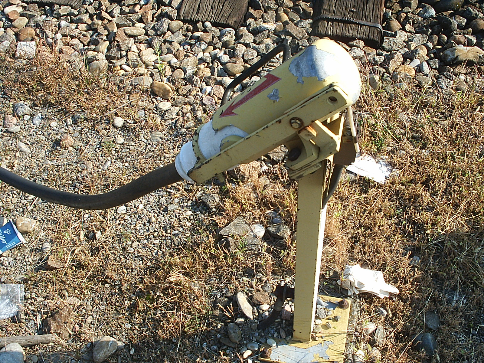 Dieses Foto zeigt eine Blinddose mit eingesteckten "Heizkabel" einer Zugvorheizanlage in der nähe des BW Basel Badischer Bahnhof.